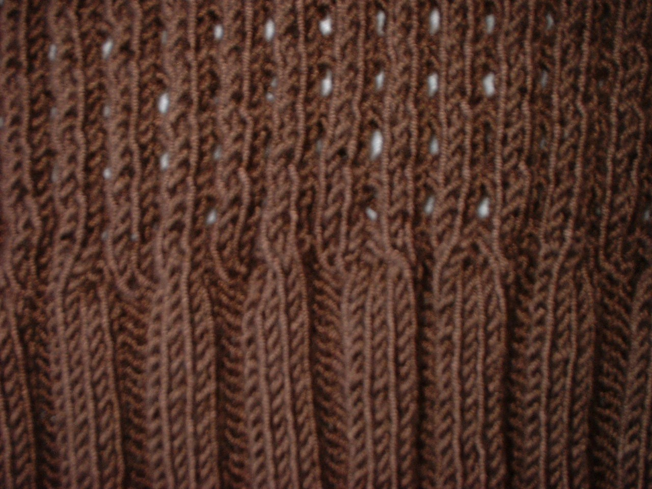 Gestrick aus Bambusgarn